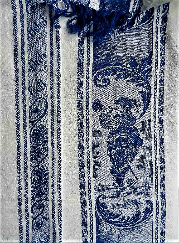 Trompeter von Säckingen als Motiv der Kunst in der Textilgestaltung, deutsch - lettische Handwebererei 19/20. Jh.